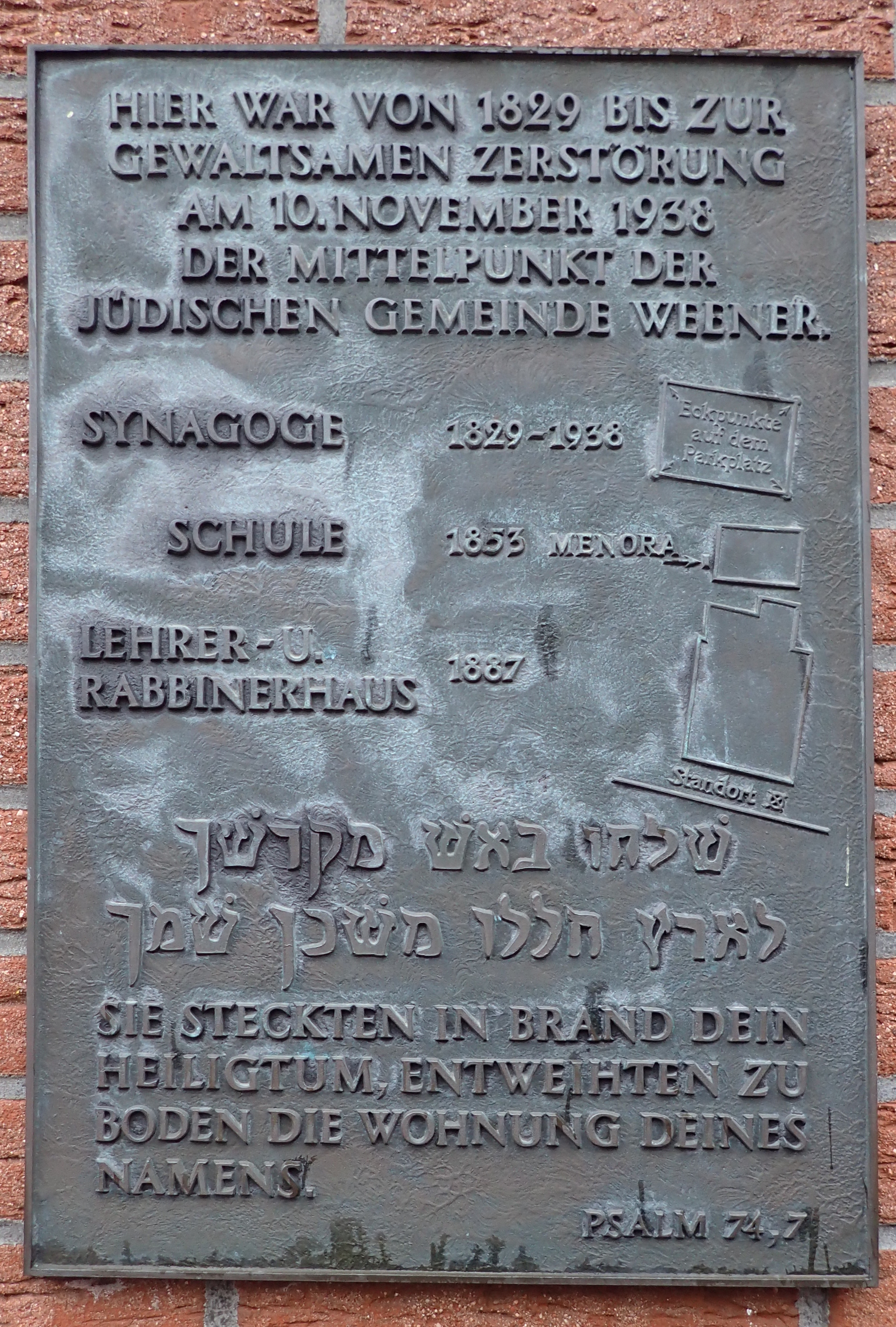 Gedenktafel Synagoge Weener in der Westerstraße 32